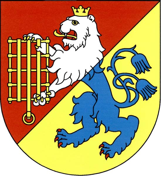 Znak obce Čistá (okres Mladá Boleslav)